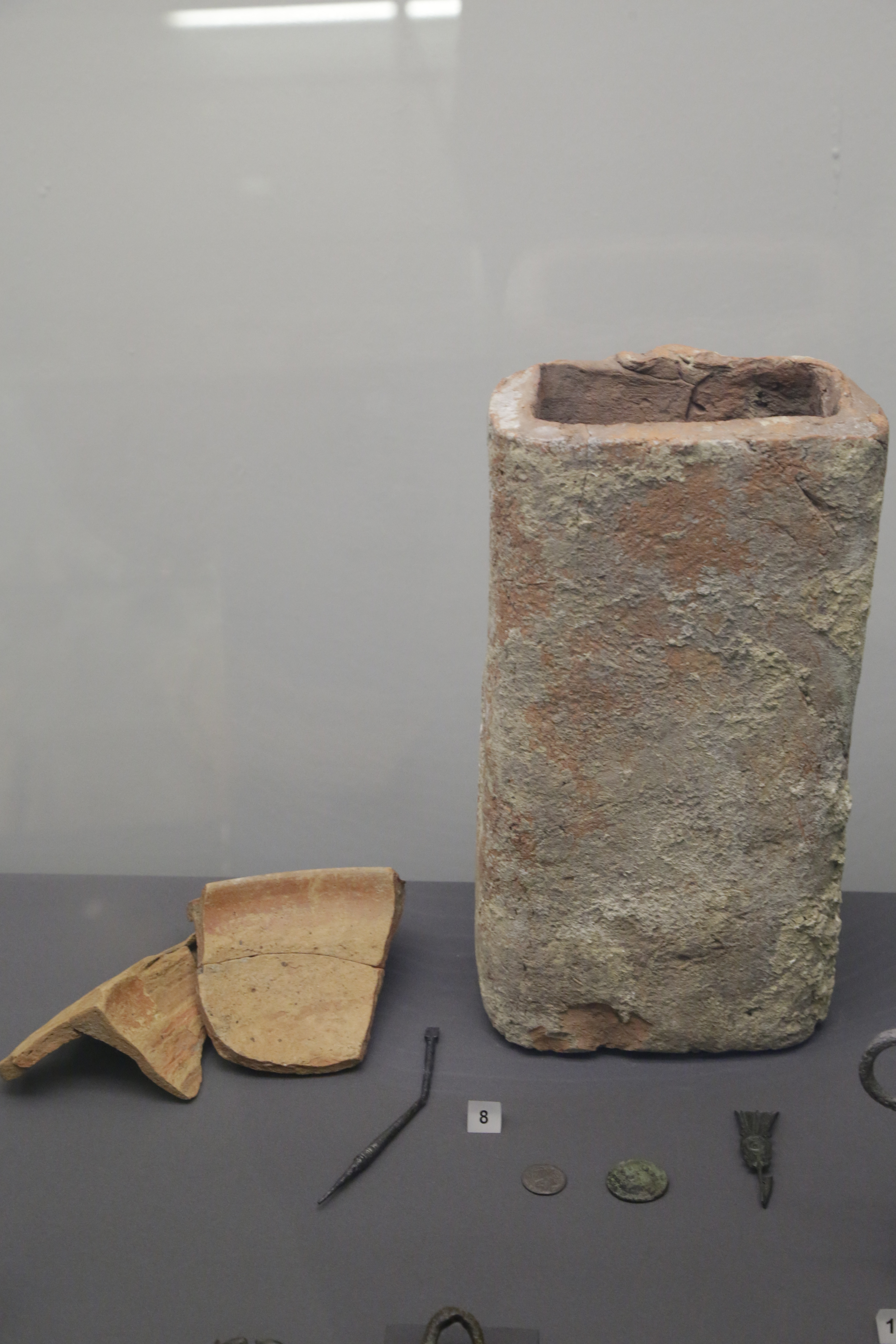 Einige Funde aus der Römischen Fundstätte in Karres, die im Tiroler Landesmuseum in Innsbruck ausgestellt sind. Es handelt sich hierbein um; Hinten Rechts; Tubulus, Ziegel für Wandheizung, ganz Links Reste einer Reibschüssel aus gebrannten Ton, Links neben Nummer Screibgriffel aus Eisen. Rechts der Nummer As des Hadiran (Bronze) 125/128 n Chr., silbener Republiksdenar von 206/195 v.Chr, Cenisolafibel in der Variante Ste aus Bronze (Mitte des 1. Jh. v. Chr)